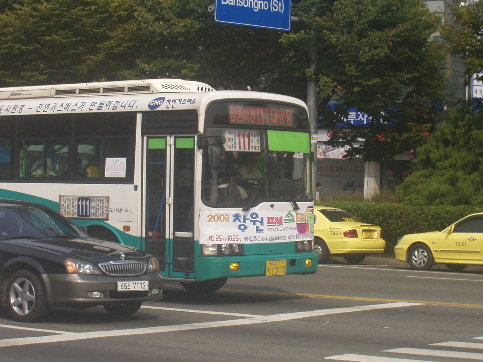 마창진시내버스 111번